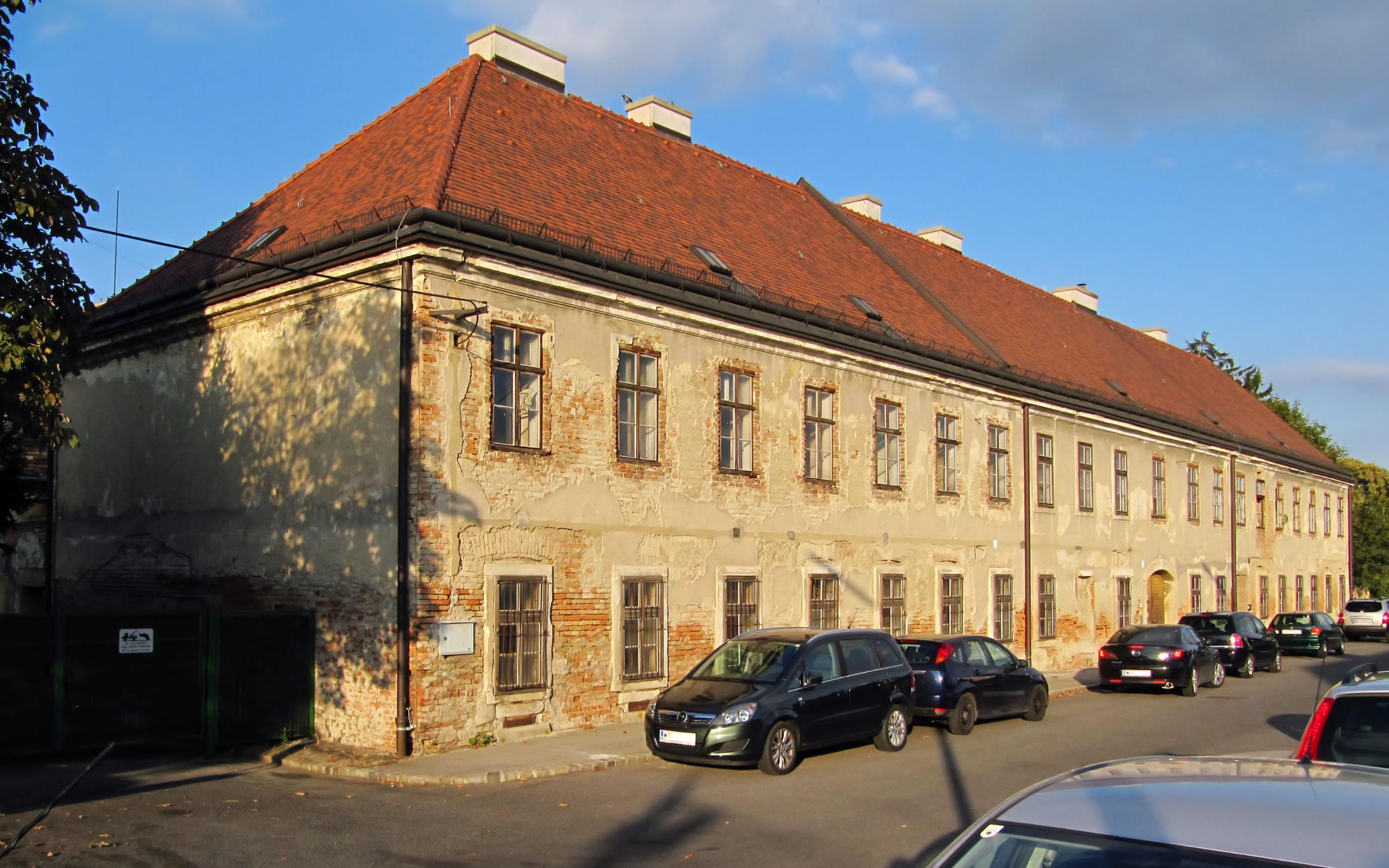 Wohnhaus, Oberes Neugebäude, ehem. Meierhof